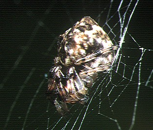 female Cyclosa sachikoae from Okinawa.